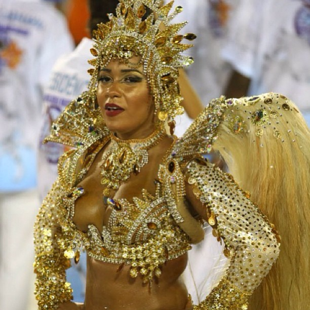 Raissa Oliveira, rainha da Beija - Flor